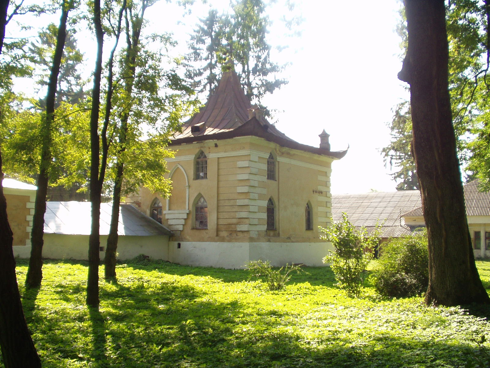 Китайський будинок, Самчики